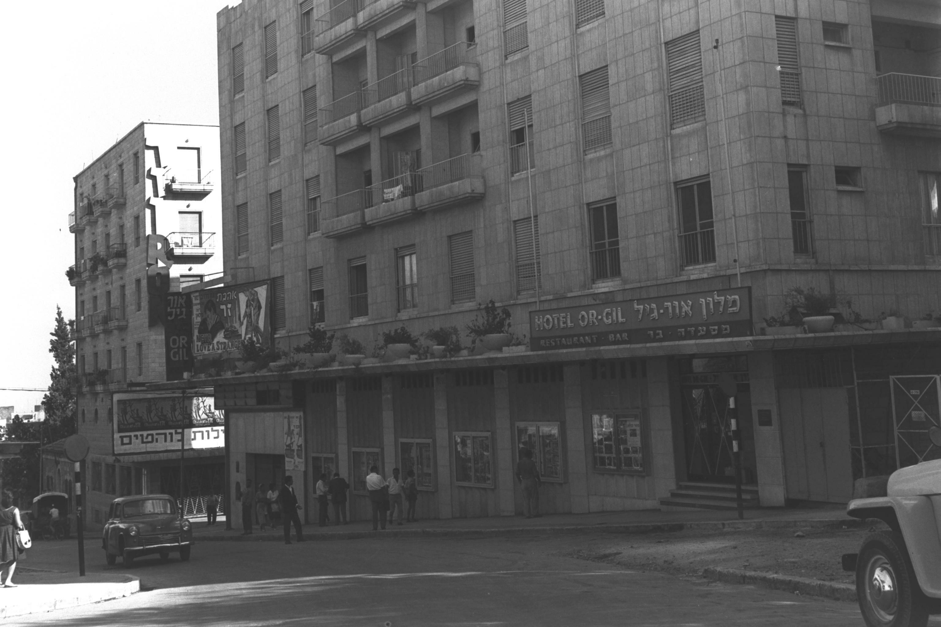 קולנוע אור-גיל נושא כרזת הסרט "חולות לוהטים" סמוך למלון אור-גיל בירושלים